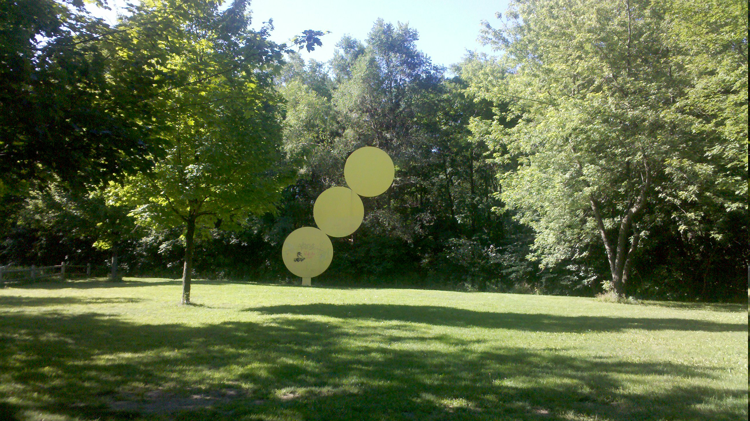 Sculpture